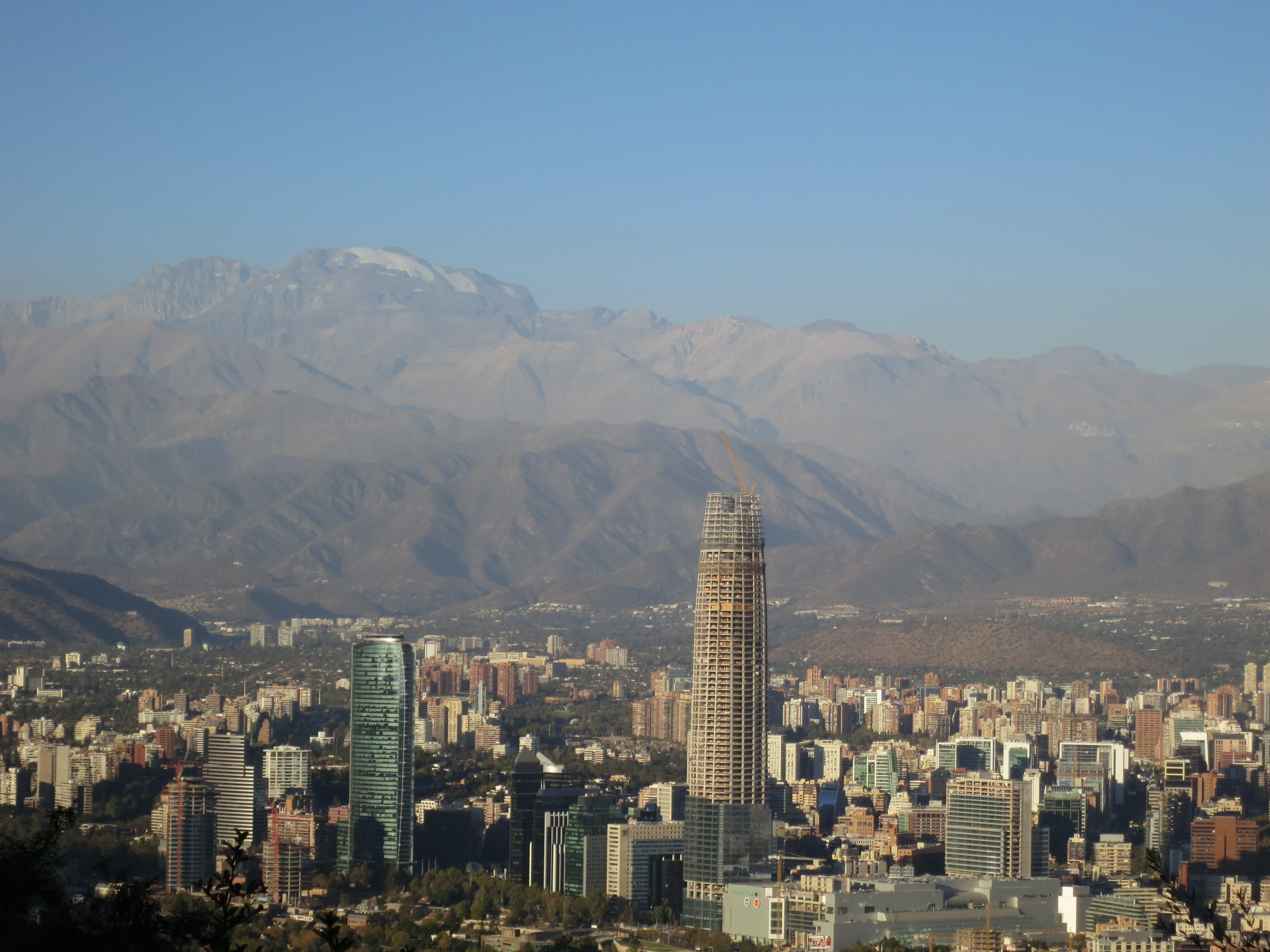 edificio ??? - Santiago, Chile